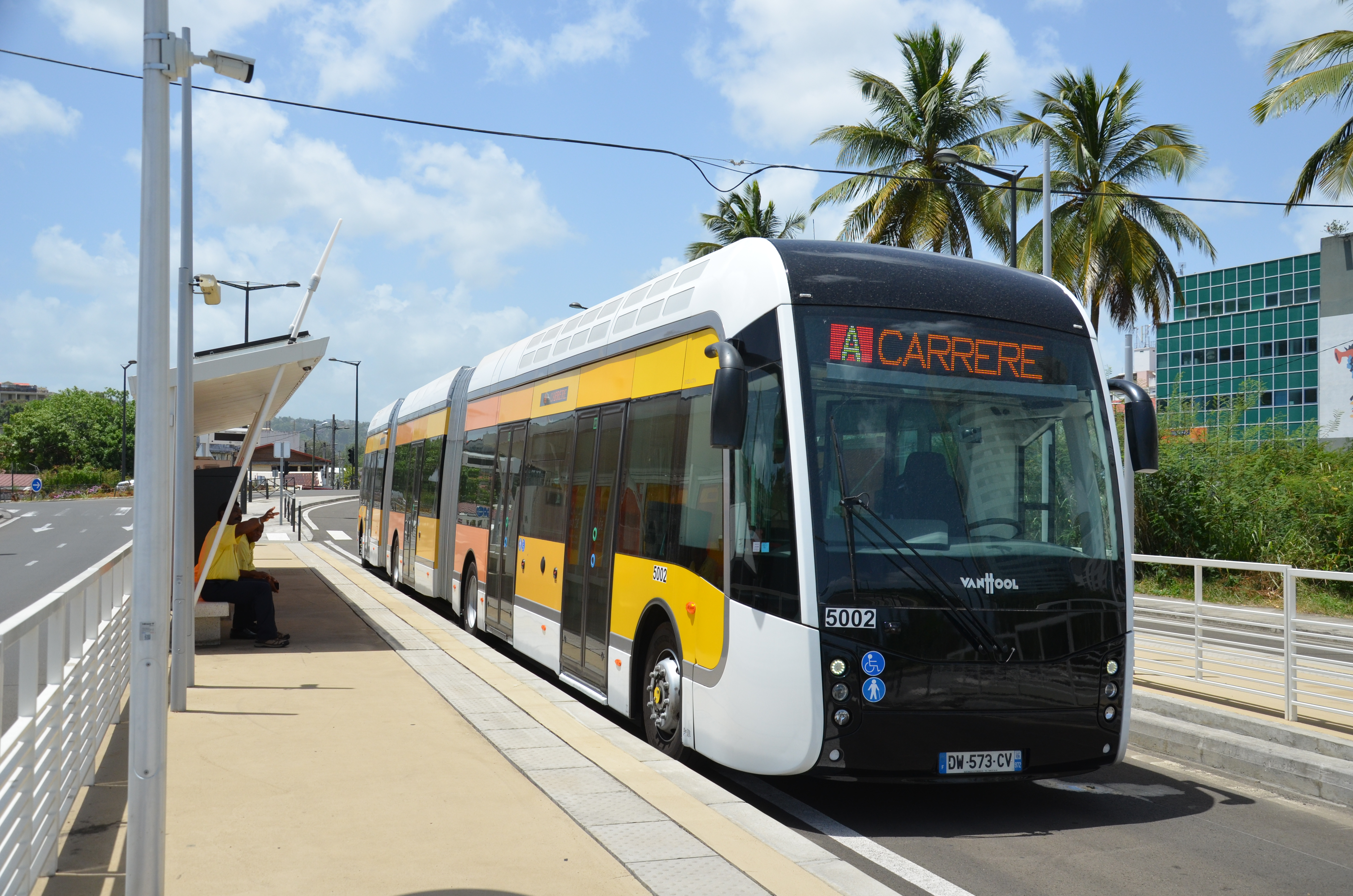 Van Hool ExquiCity 24 n°5002 sur la ligne A du TCSP de Martinique durant la marche à blanc, au terminus de Fort-de-France Almadies.